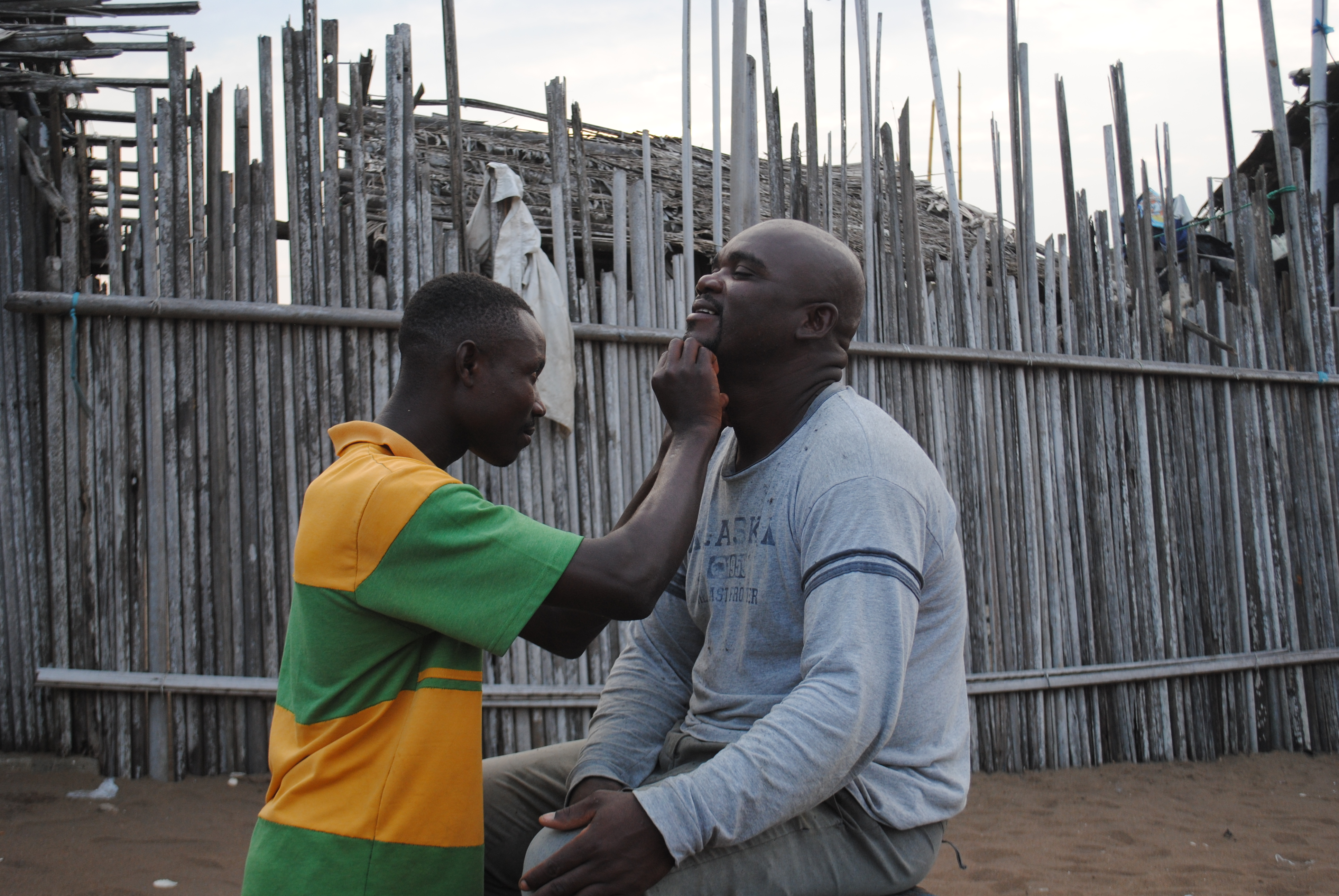 Un barbier en activité à Grand-Lahou. This is an image of "African people at work" from Ivory Coast